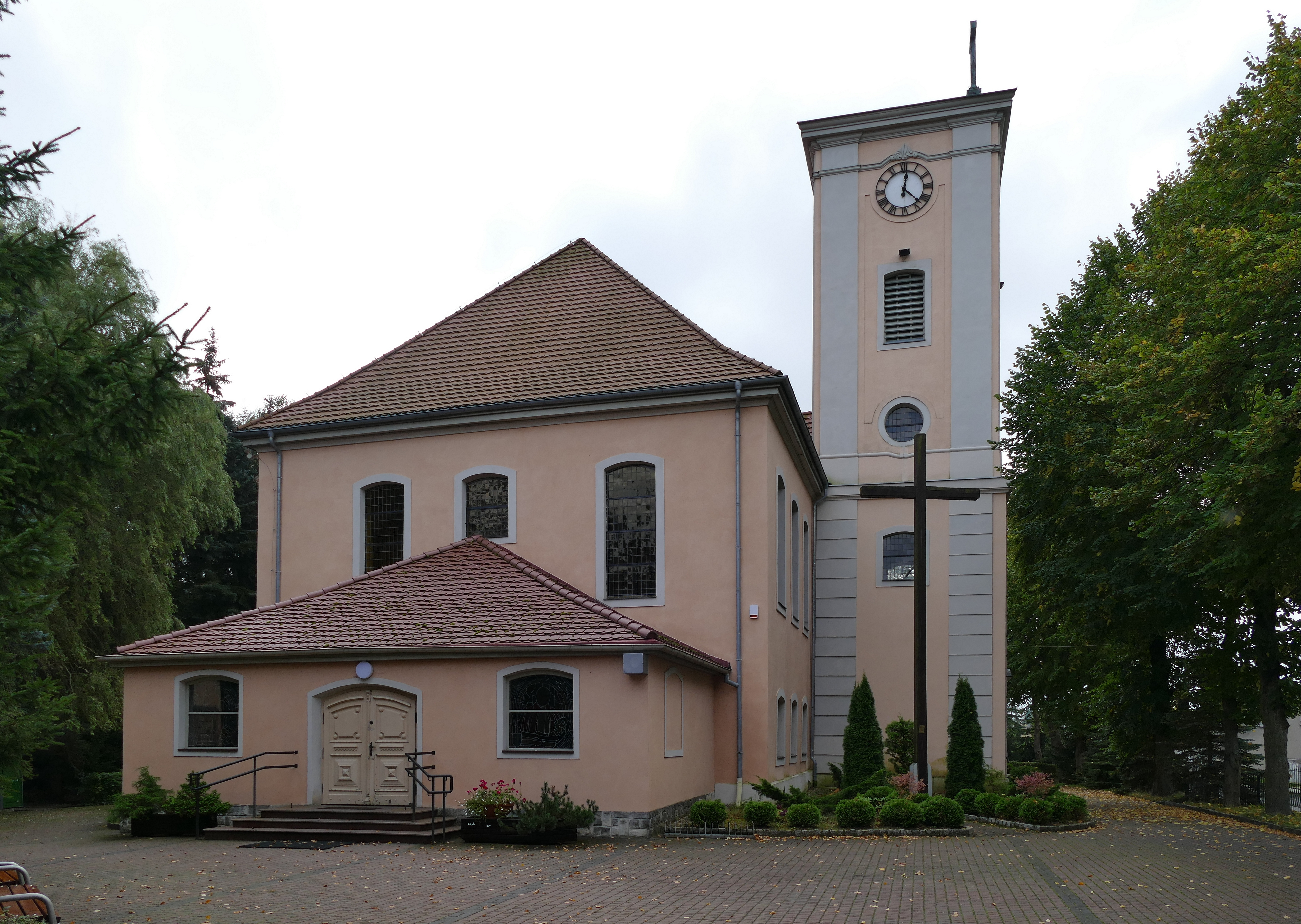 Dobrzany, dawny kościół ewangelicki, ob. rzym.-kat. par. p.w. św. Michała Archanioła, 1782